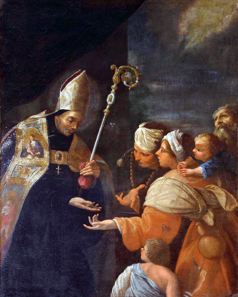 Il Santo, con piviale, mitria e pastorale, soccorre i poveri, tra i quali sono due uomini, una donna e due bambini. Fondo scuro.